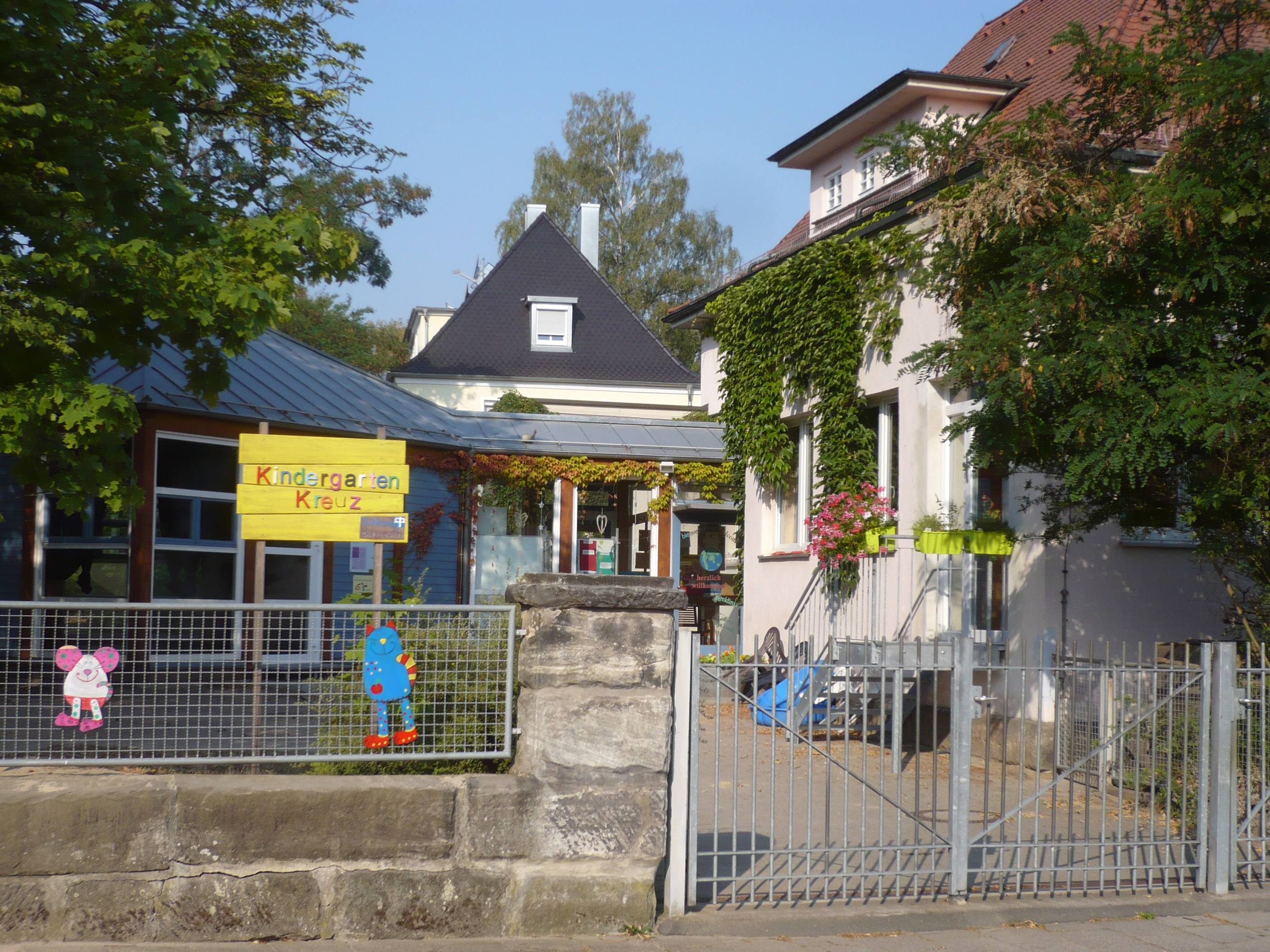 Evang. Kindergarten Bayreuth-Kreuz